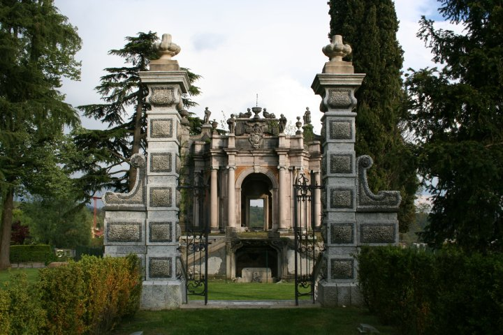 Comério, Villa Tatti, Varense.